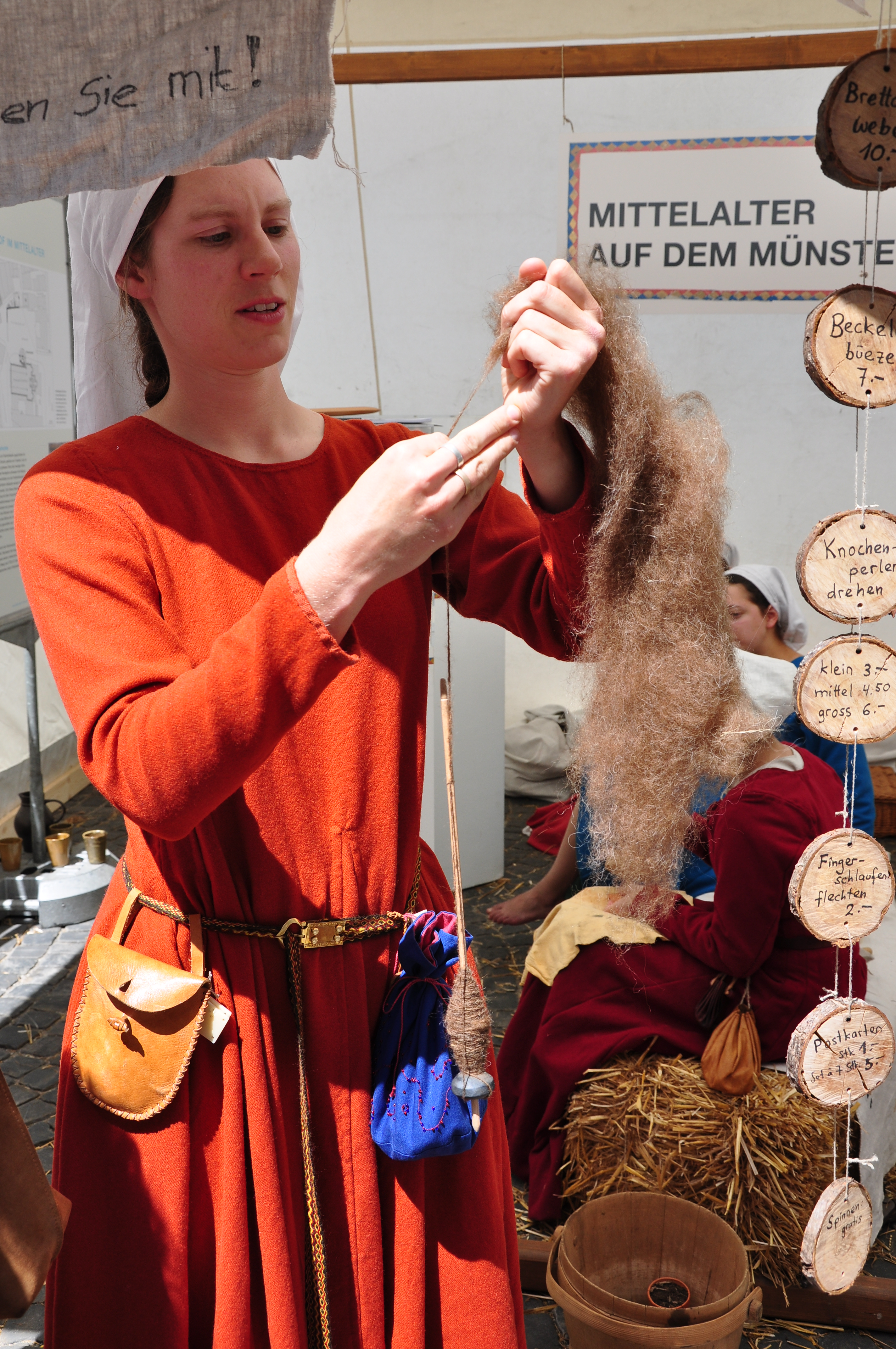 Mittelalter Spectaculum (20. bis 22. Mai 2011) der Gesellschaft zu Fraumünster auf dem Münsterhof in Zürich (Switzerland)